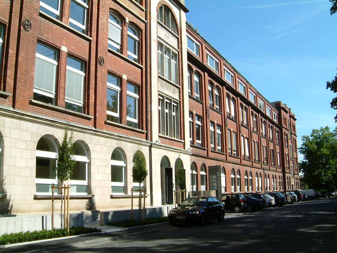 Arch. Franz Kleinsteuber, Würzburg, Stürtz-Universitätsdruckerei